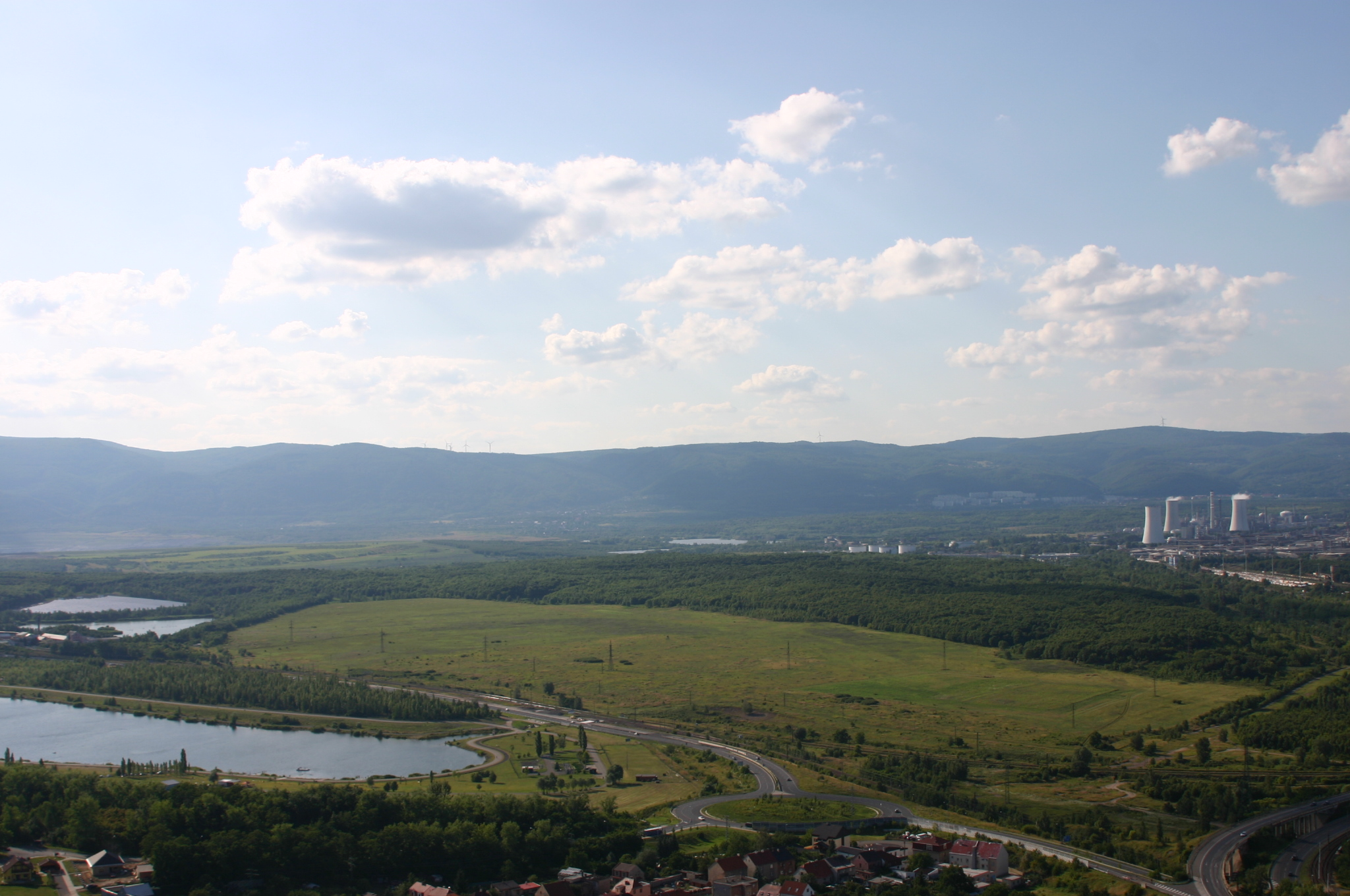 Kopistská výsypka v okrese Most.